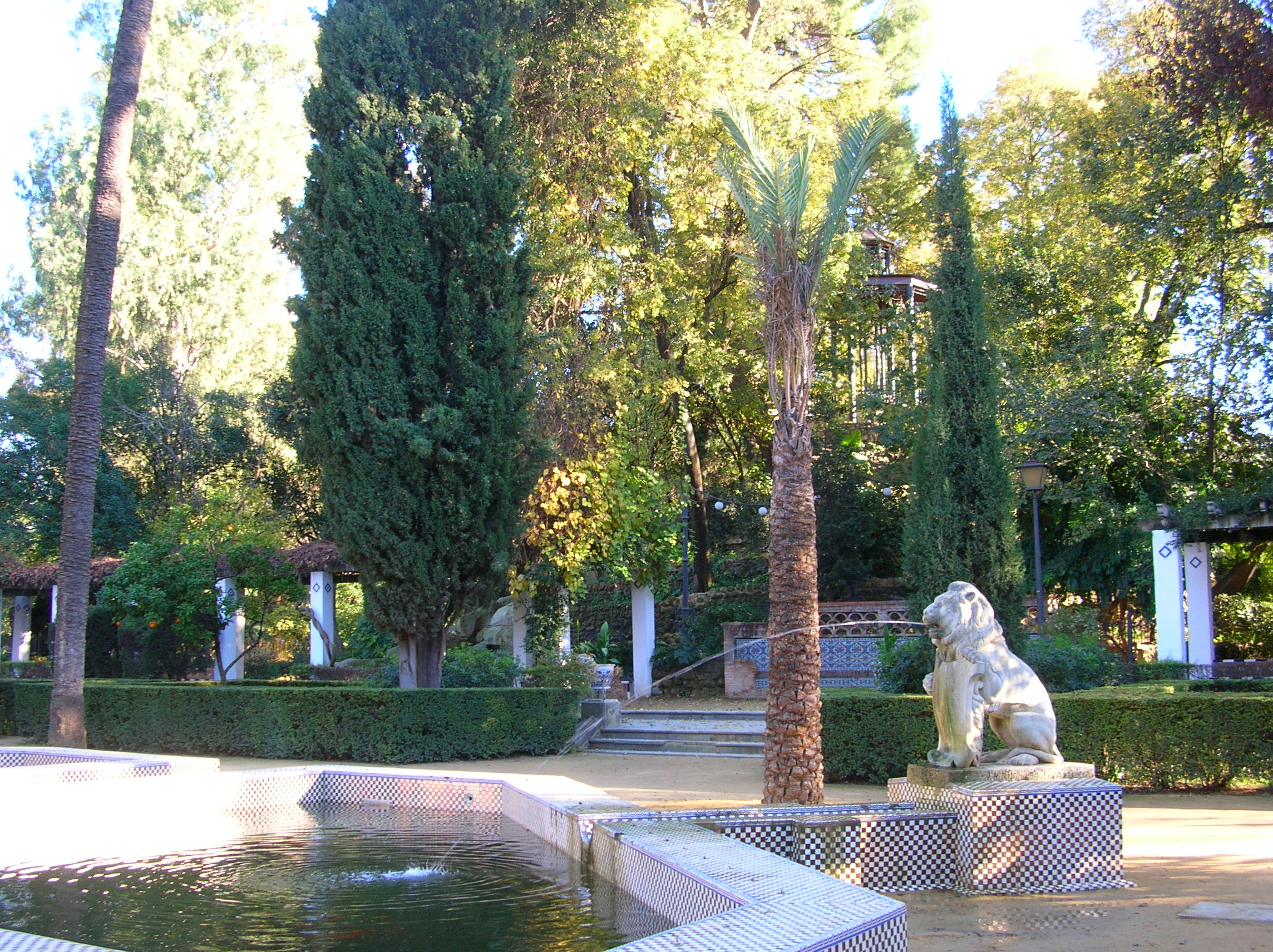 Fuente de los Leones en el Parque de María Luisa, Sevilla, España